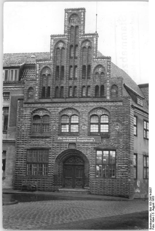 Rostock, altes Stadthaus Zentralbild Klein-5.8.1953 UBZ.: Das alte Stadthaus hinter dem heutigen Rathaus steht unter Denkmalschutz und wird erhalten bleiben.